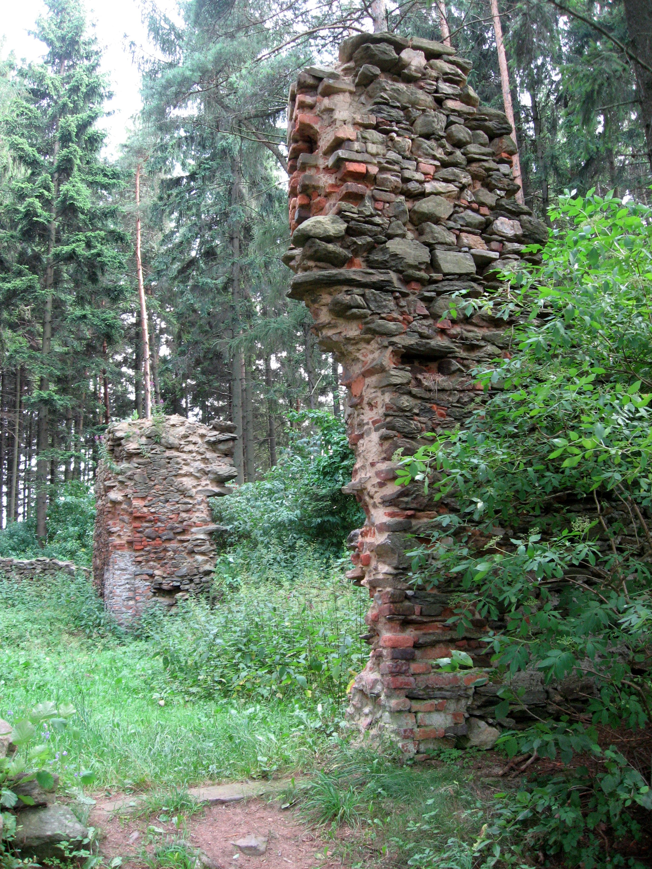 Zřícenina nad Úsobím